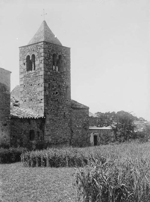 Imatge